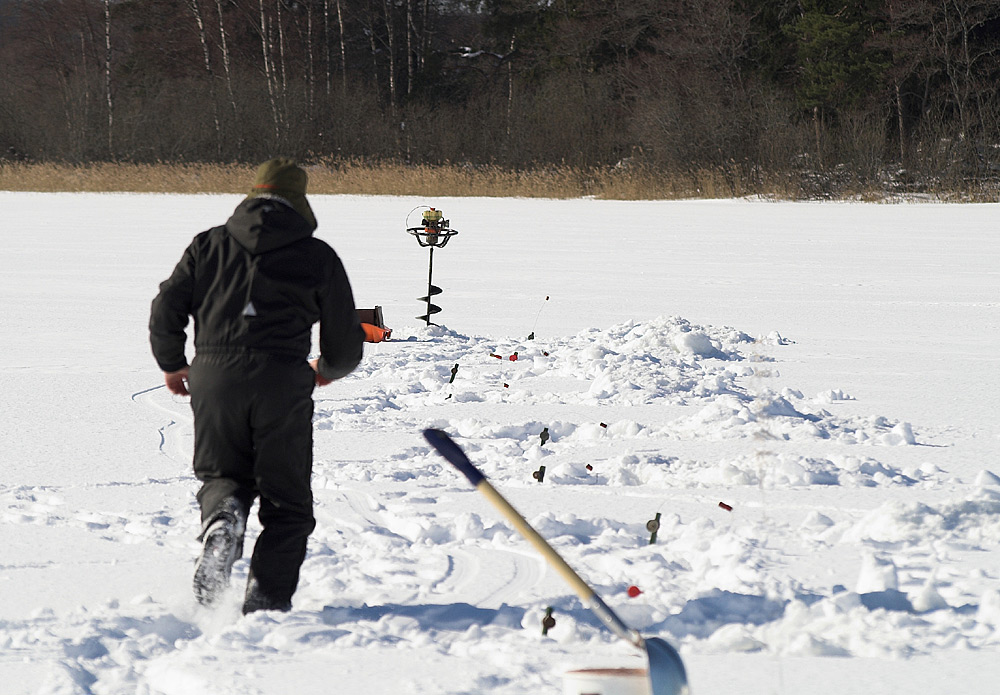 Photo taken by: Gustaf Eriksson Angling på insjö